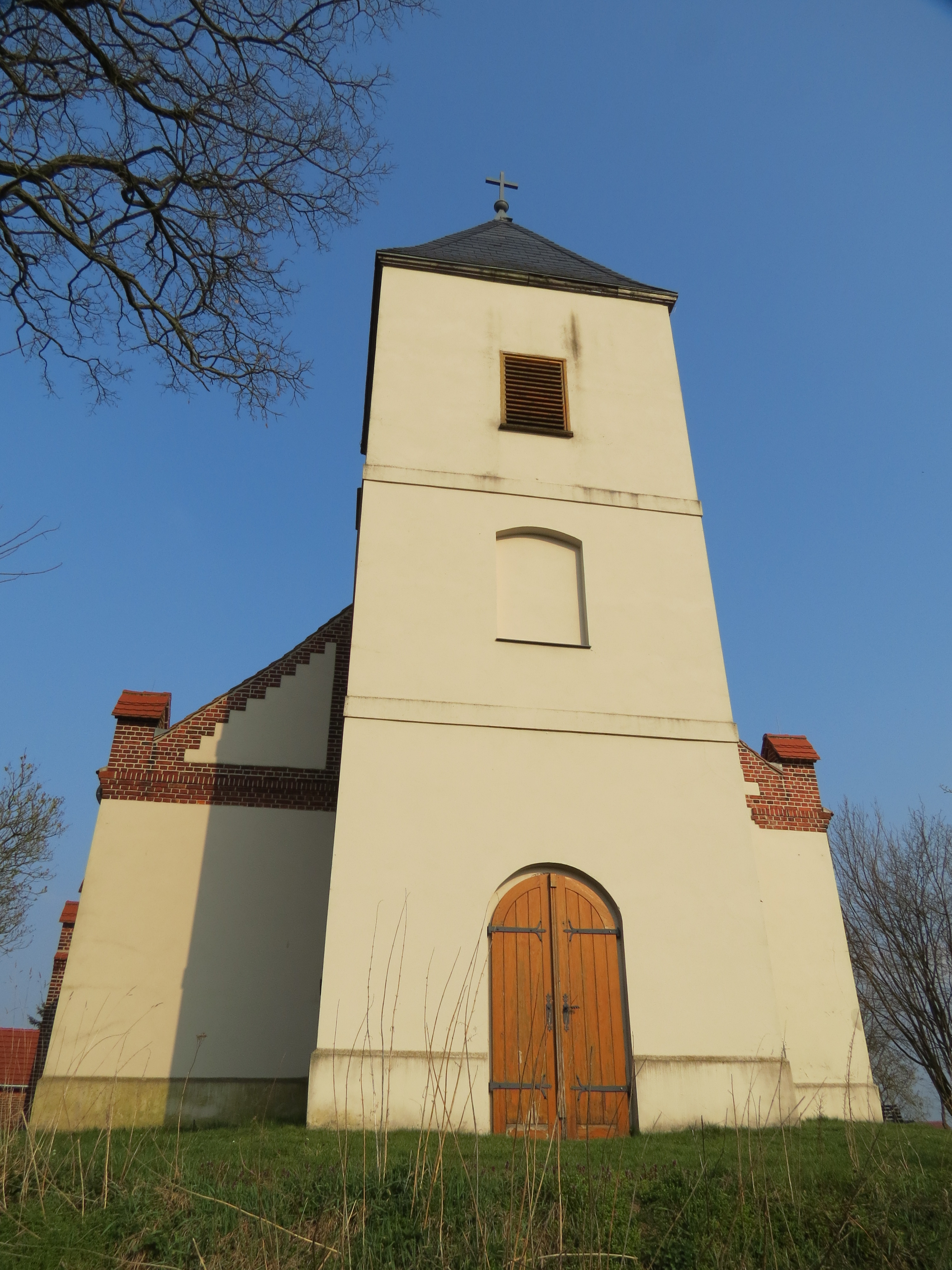 Dorfkirche Trebitz, Westseite, Trebitz, Ortsteil der Stadt Lieberose, Lkr. Dahme-Spreewald, Brandenburg, Deutschland